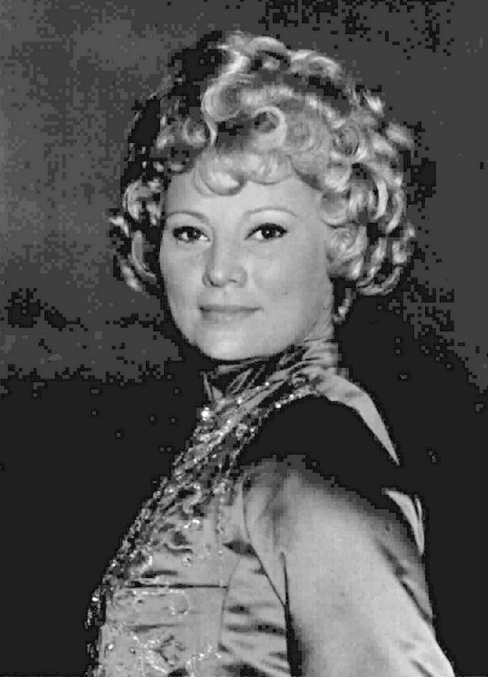 Actress Hélène Rémy in the Italian TV-series I giovedì della signora Giulia